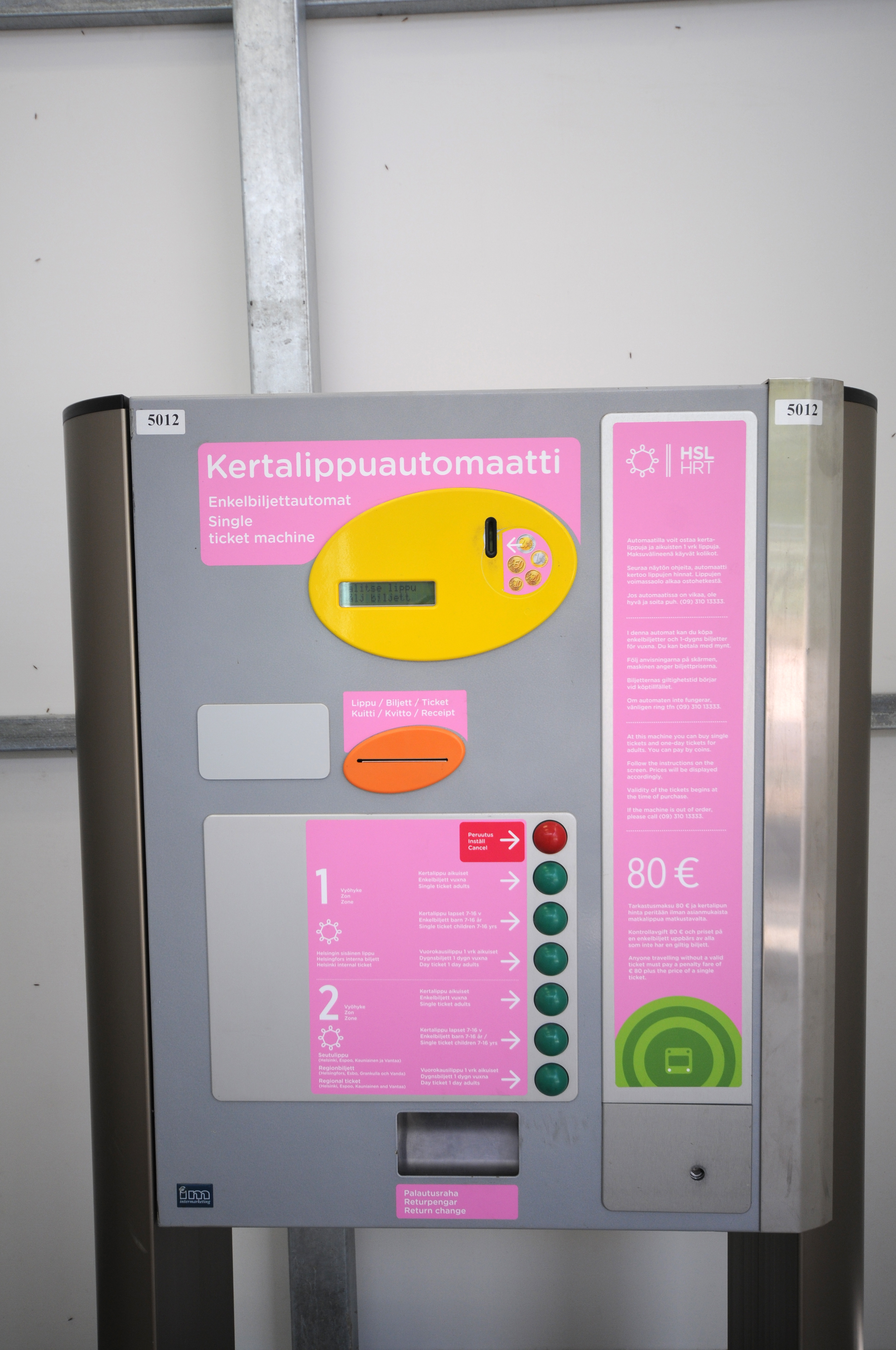 Helsinki